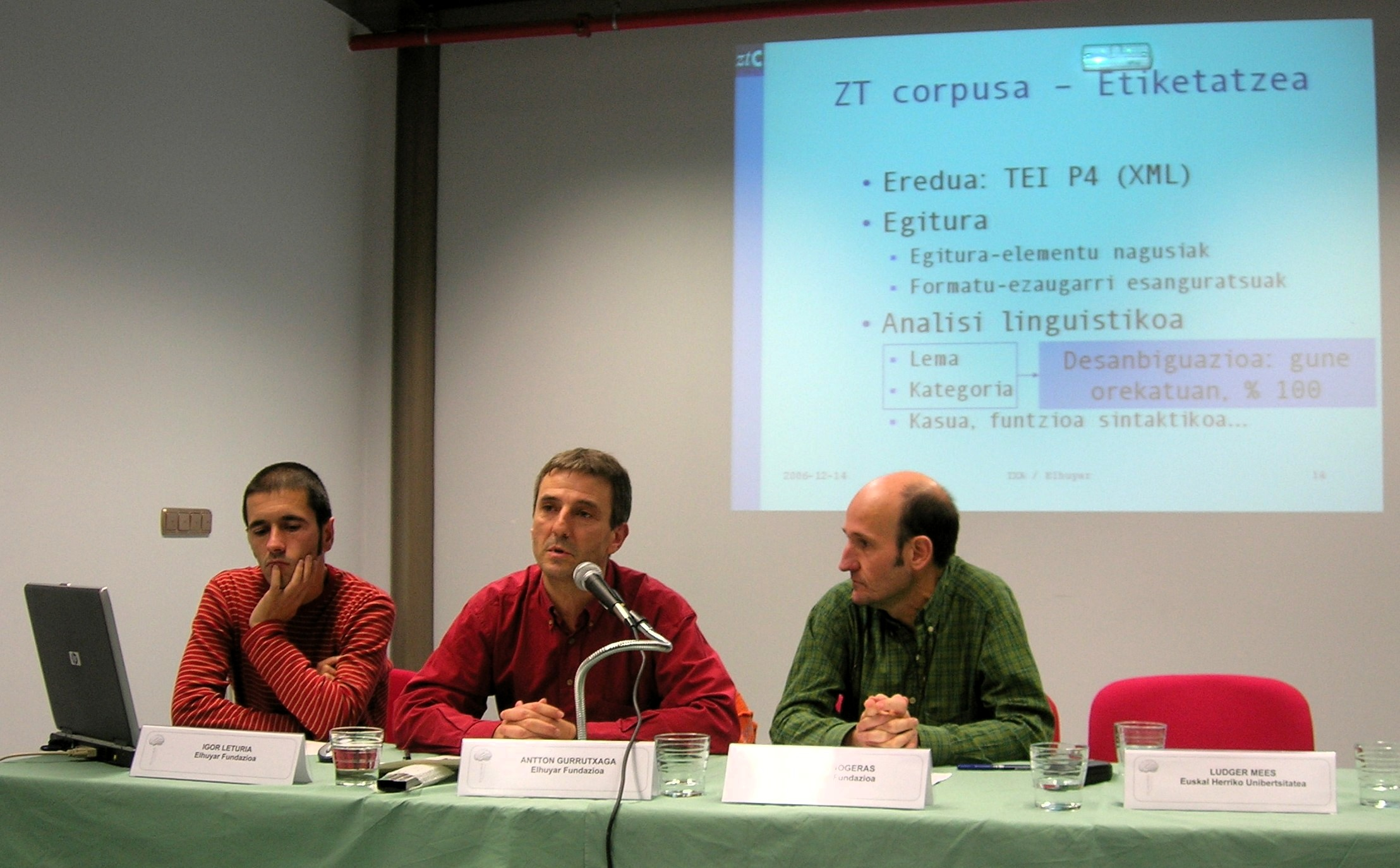 Elhuyar Fundazioko Igor Leturia eta Antton Gurrutxaga, Ixa Taldeko Xabier Artolarekin Zientzia eta Tekbologia Corpusaren aurkezpenean (2006-12-14)